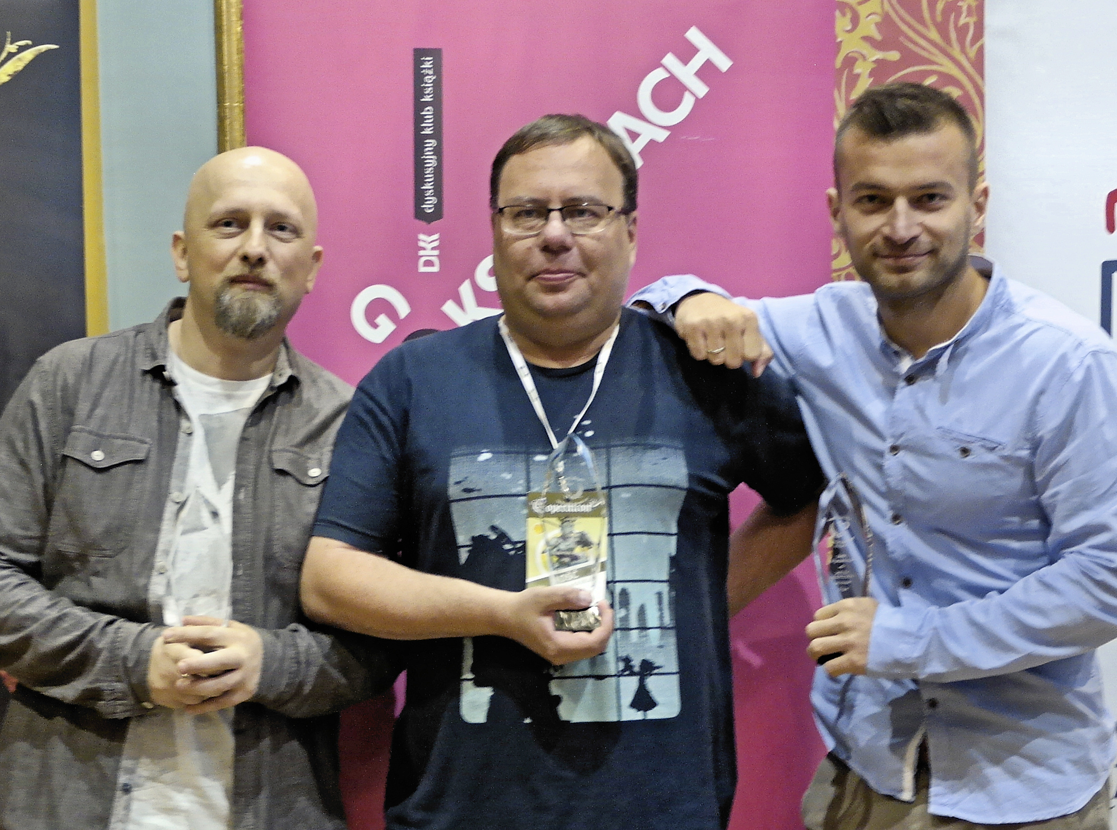 Wegner, Majka, Małecki - Copernicon, Toruń 2016